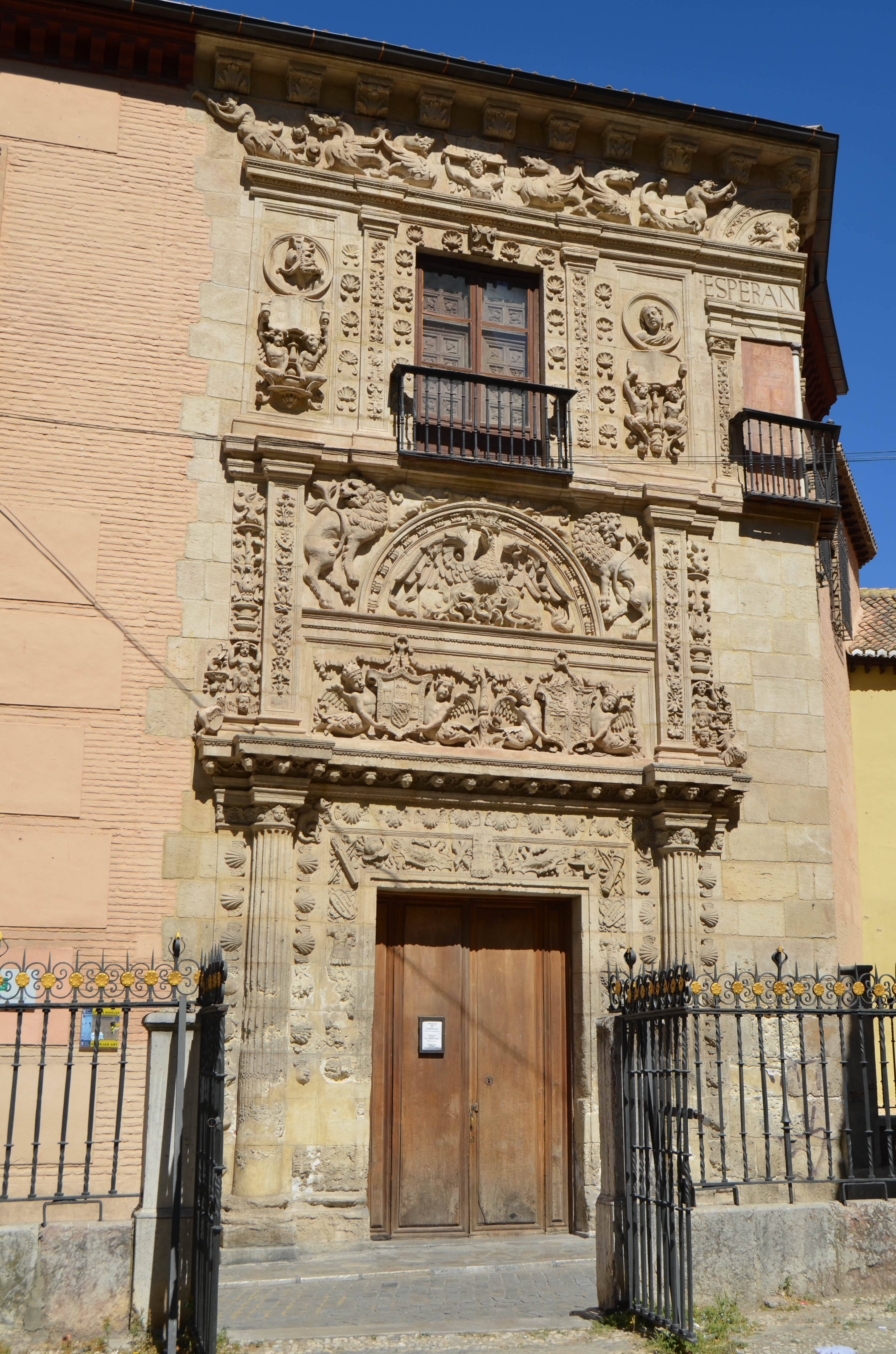 Museo Arqueologico de la Alhambra,Granada. RI-51-0001360